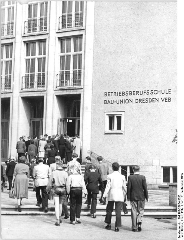 Dresden, Betriebsberufsschule Zentralbild Hö.-Po. 2.9.1955 Lehrbeginn der Dresdner Bau-Jungarbeiter Der VEB Bau-Union nahm am 1.9.1955 junge Bauarbeiter zu einer gründlichen Facharbeiterausbildung auf. In der schwer zerstörten Stadt Dresden haben die neueintrotenden Lehrlinge mehrere Lehrbaustellen. Diese Lehrlingsbauten, große Wohnblöcke, liegen innerhalb des Aufbauprogramms Dresdens. UBz: Nach der Lehrbeginnfeier ging es in die große vorbildliche Betriebsberufschule der Bau-Union.